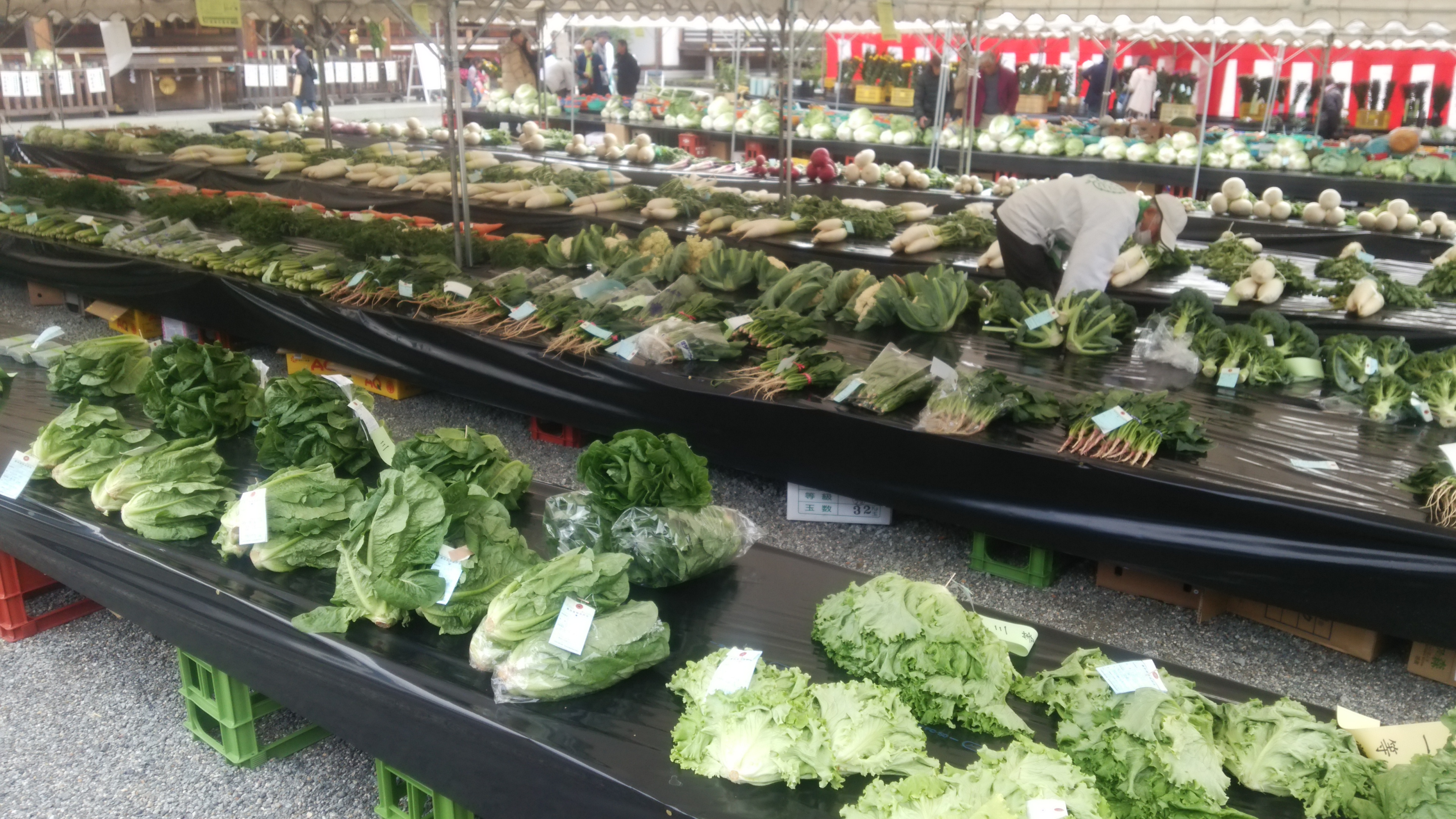 大神神社豊年講の品評会